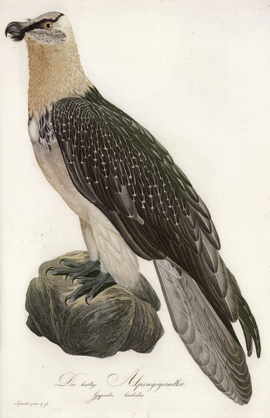 Der bartige Alpengeyeradler (Gypaetus barbatus) (= Bartgeier), aus: Johann Conrad und Johann Theodor Susemihl: Teutsche Ornithologie oder Naturgeschichte aller Vögel Teutschlands in naturgetreuen Abbildungen und Beschreibungen, Gießen, Heyer und Darmstadt, Carl und Leske, wohl 1802-1812